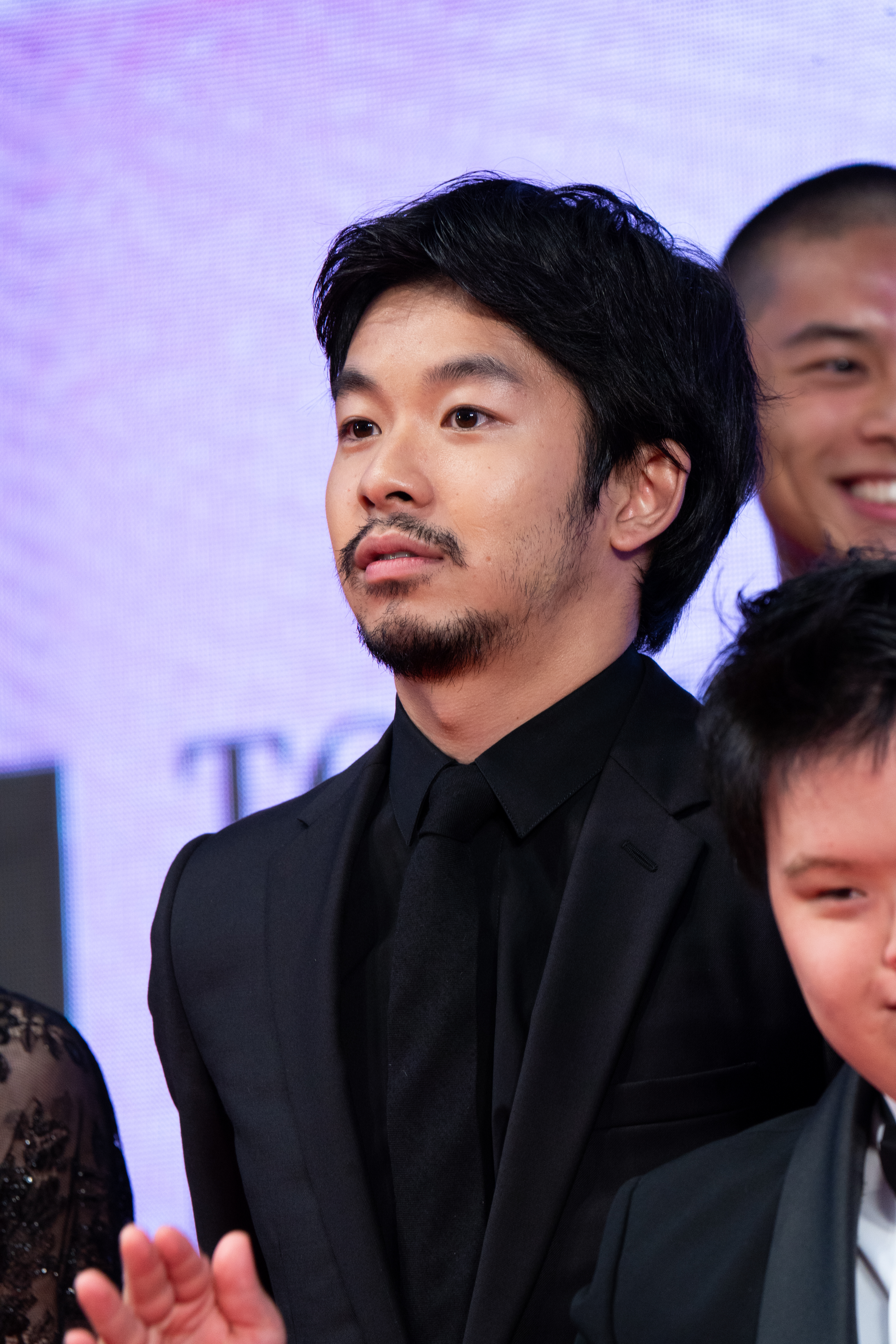 第32回 東京国際映画祭 オープニングセレモニー 仲野太賀 (タロウのバカ)